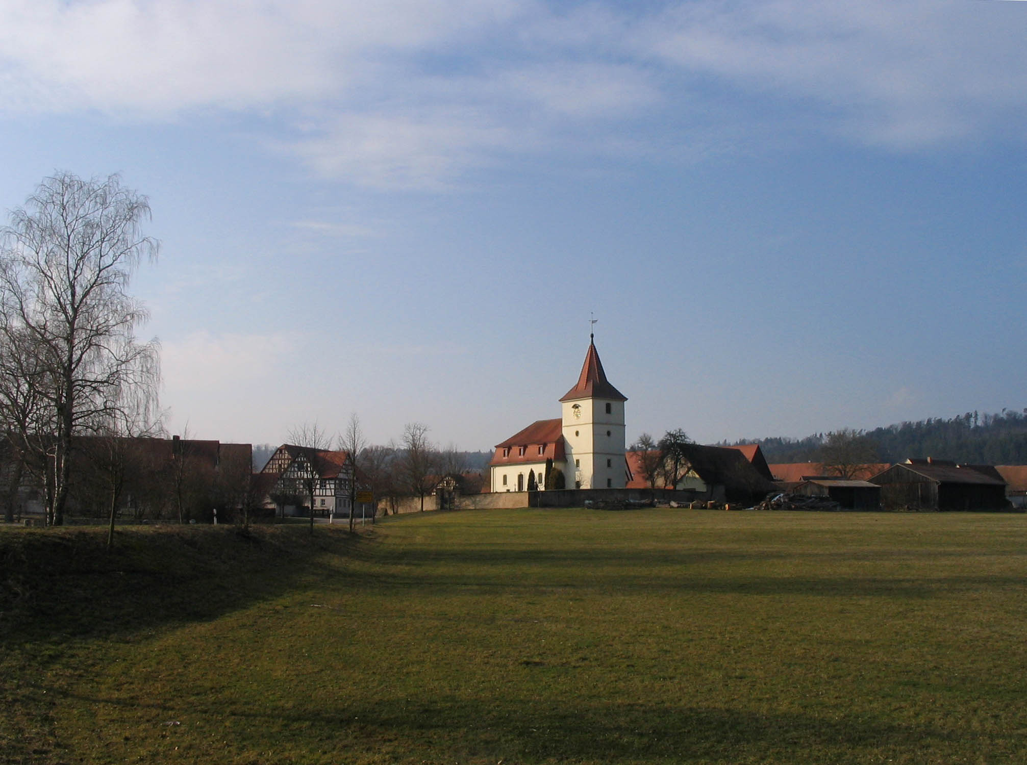 Sicht auf Häslabronn mit Blick auf St. Jakob